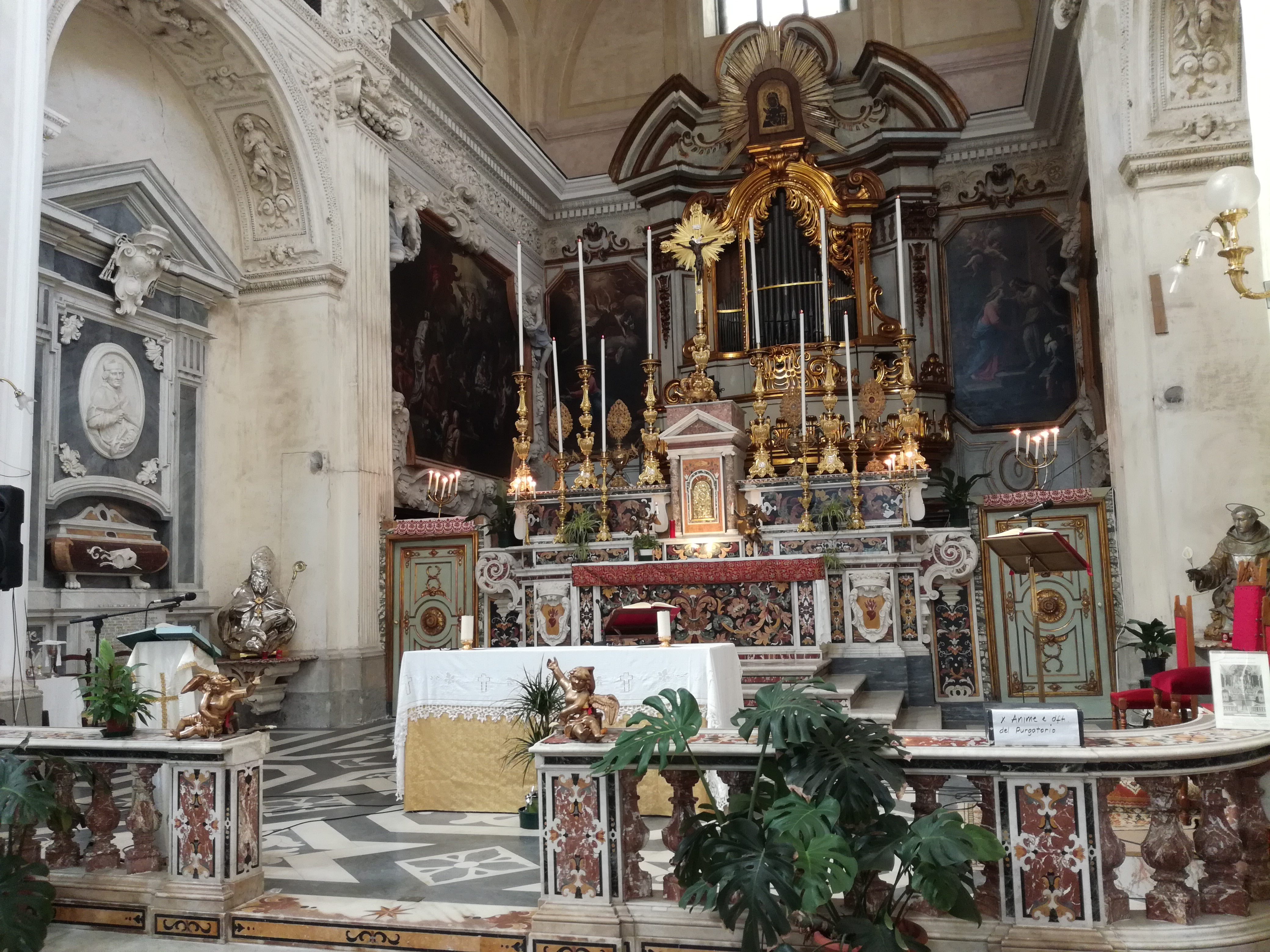 Altare Maggiore Santa Maria della Verità